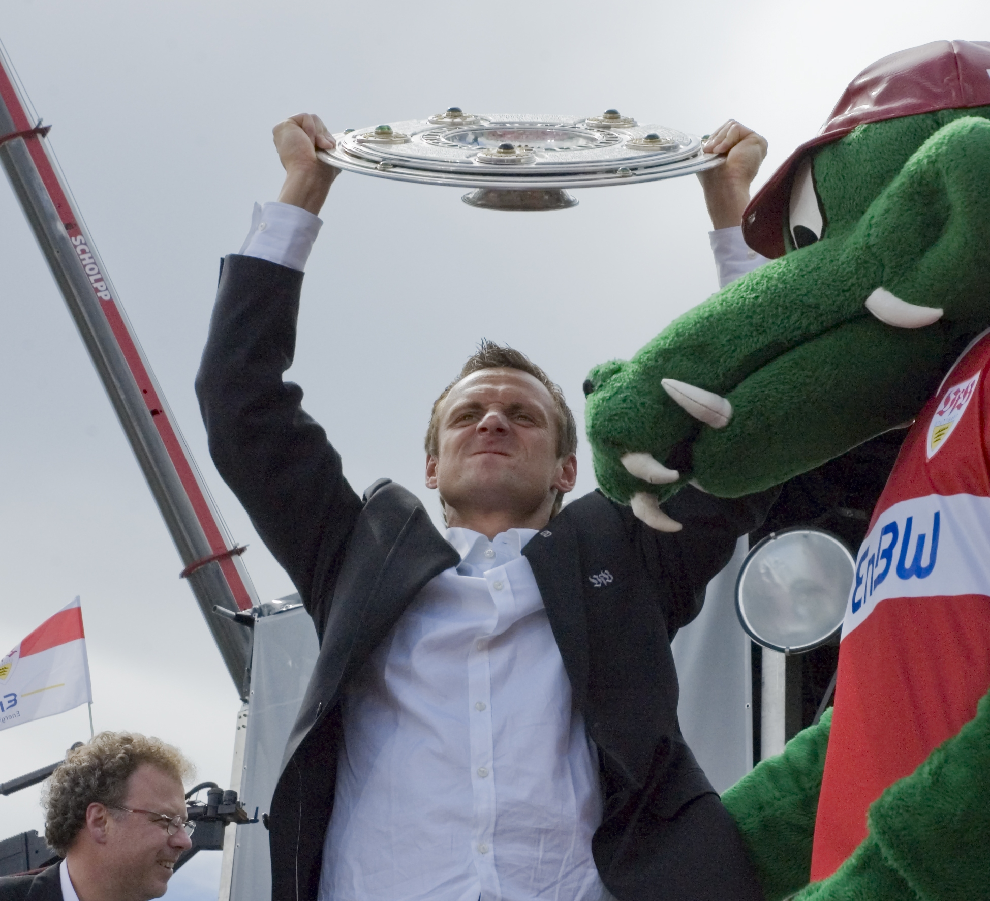 Heiko Gerber bei der Meisterfeier des VfB Stuttgart